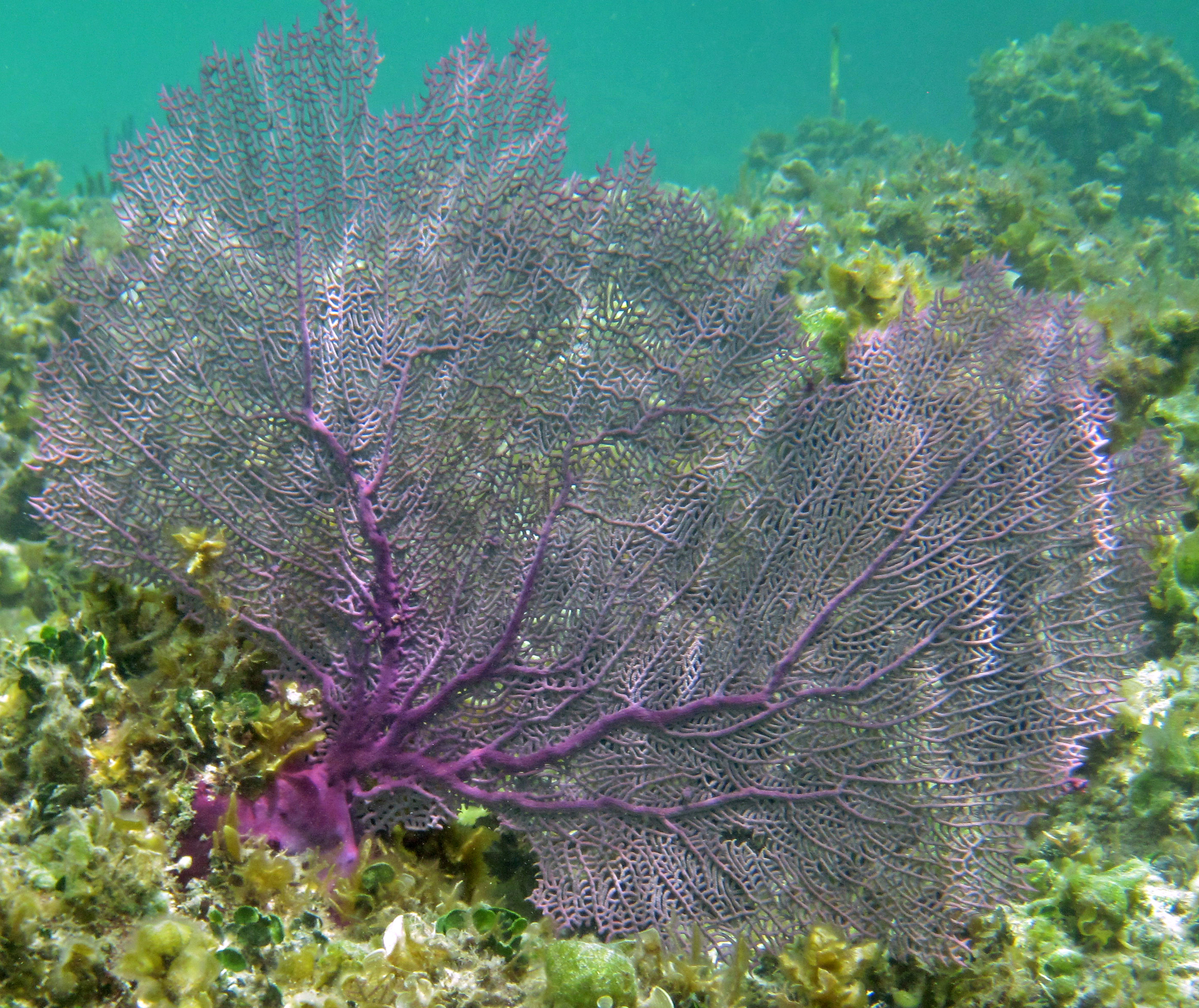 Gorgonia ventalina, en Cut Cay, isla San Salvador, Bahamas